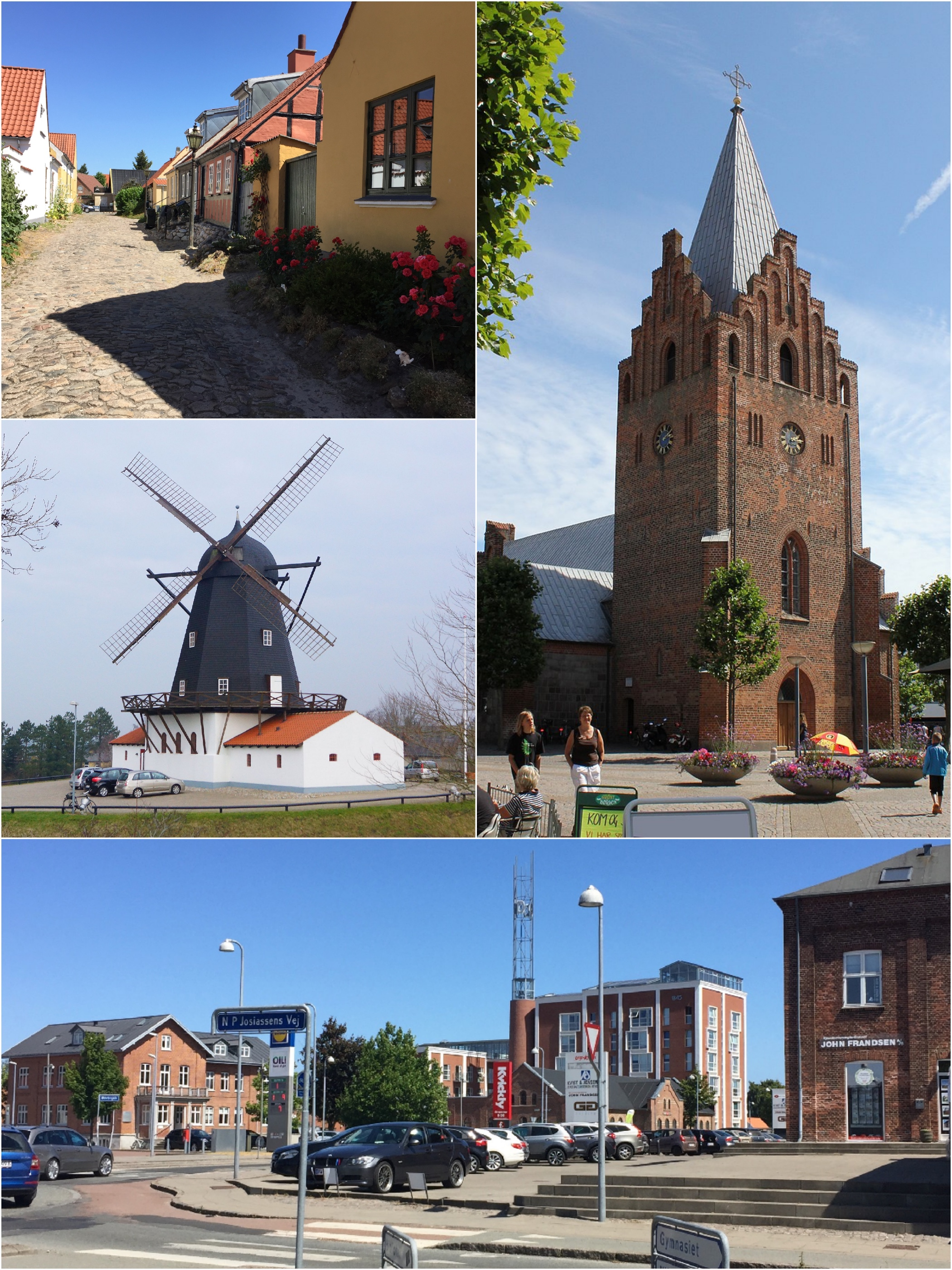 Kollage af Grenaa. Øverst til venstre er et billede af Nederstræde, der er en gammel gade i det centrale Grenaa. Billedet i midten til venstre er af Baunhøj Mølle, der er Grenaas vartegn. Møllen ligger på toppen af Baunhøj, der er et af byens højeste punkter. Fotografiet af Baunhøj Mølle er taget af Sebastian Nils. Billedet i øverste højre hjørne er Skt. Gertruds Kirke eller Grenaa Kirke. Den ligger i Grenaa centrum. Kirken er bygget ca. 1300, men kirkens indre i 1649 ødelagt ved en brand. Genopbygningen i 1650'erne blev til et hvælvet kirkerum .Den er bygget af munkesten og granitkvadre. En ombygning i 1870'erne har givet kirken dens karakteristiske spir med kamtakker. Fotografiet er taget af S.Juhl. Nederste billede er Grenaa Dampvæveri, der lukkede i 2002, men nu er handelscentrum og genopført som boliger.